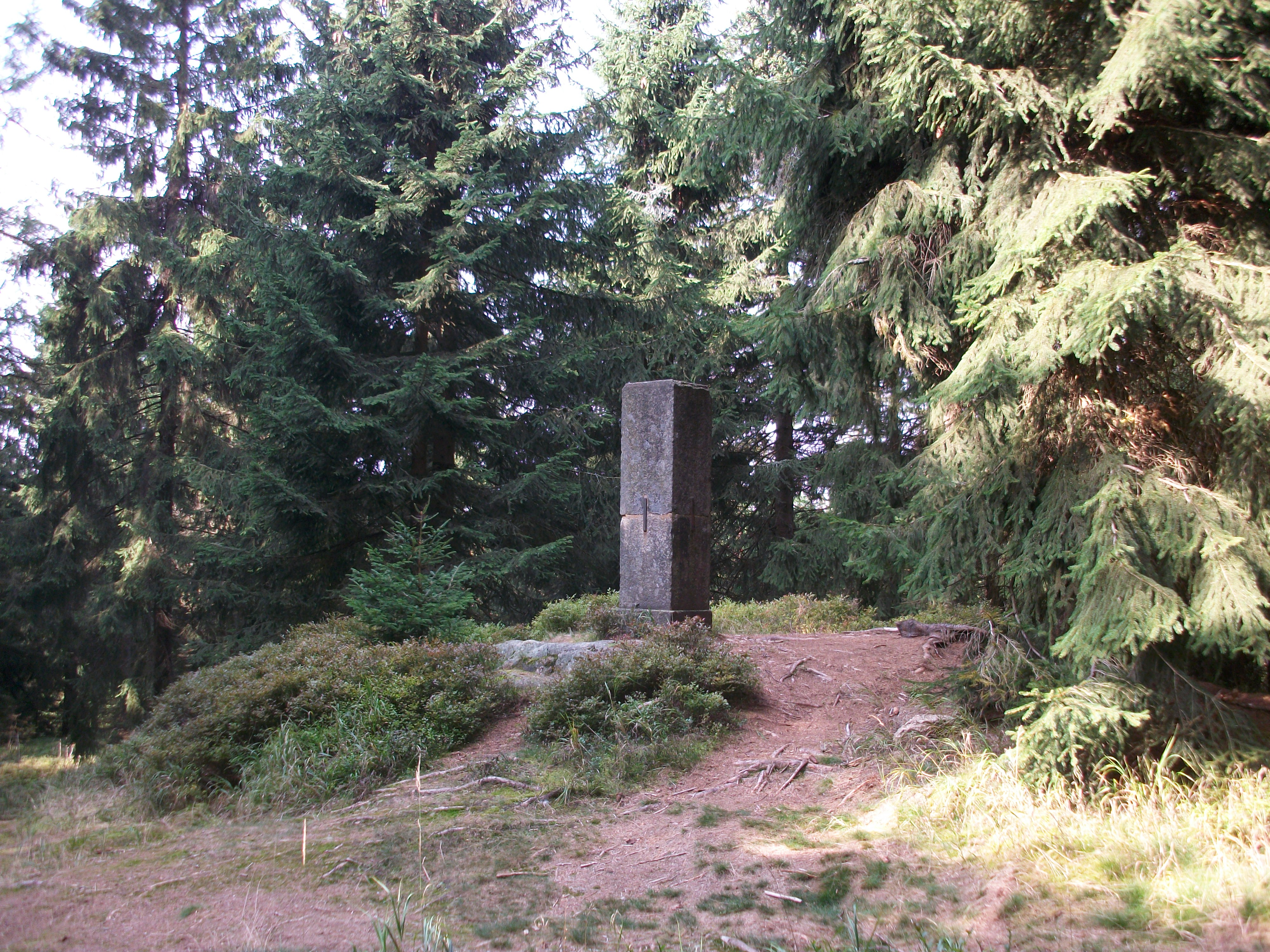 Aschberg, Gipfelstein auf tschechischer Seite